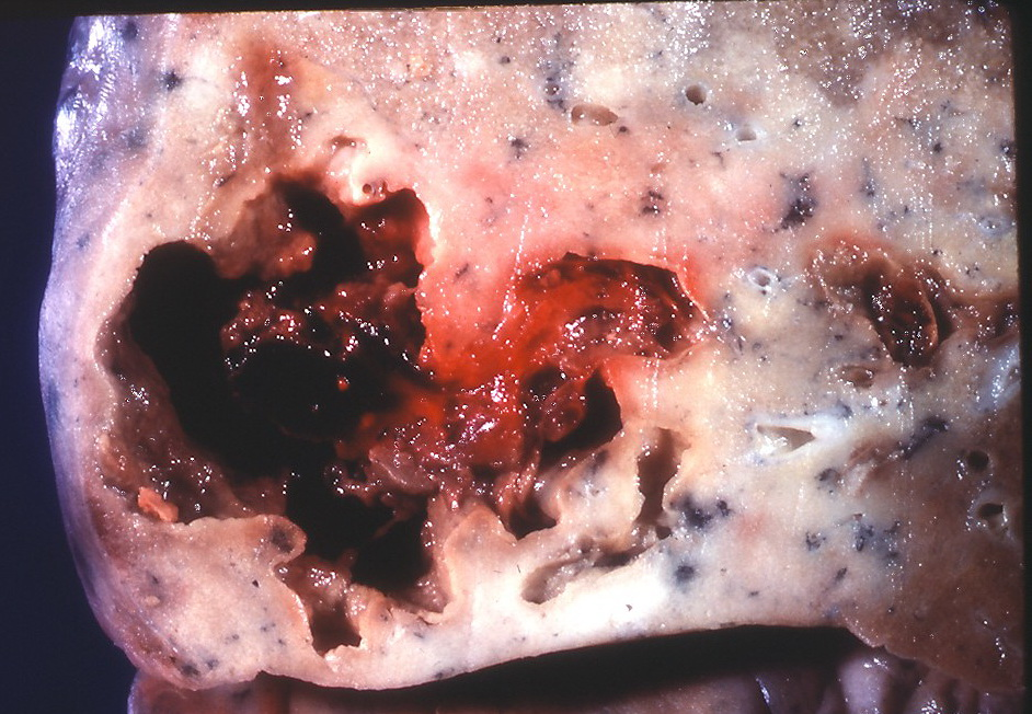 Abscess